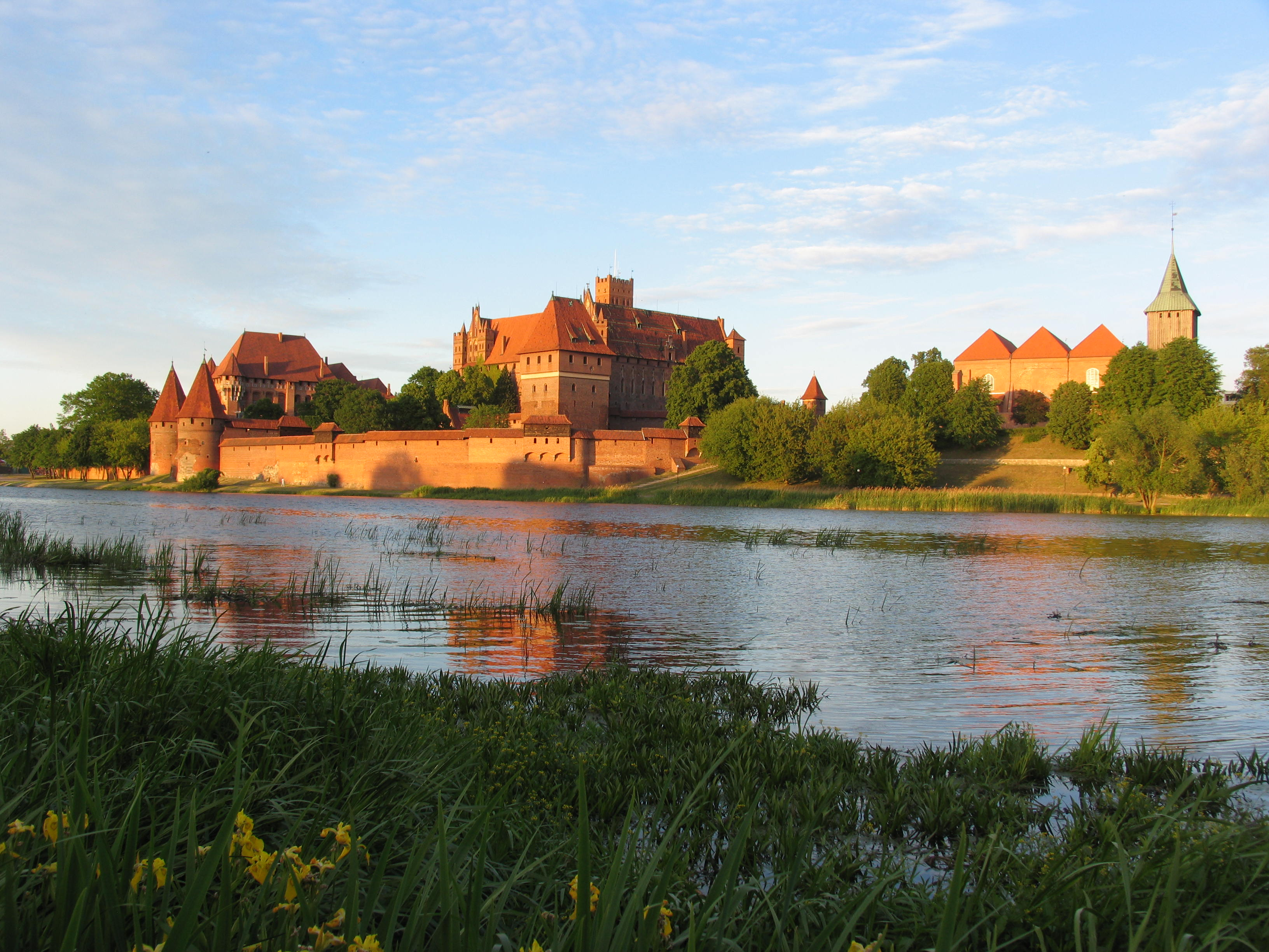 Malbork, zespół zamku krzyżackiego, XIII, XIX